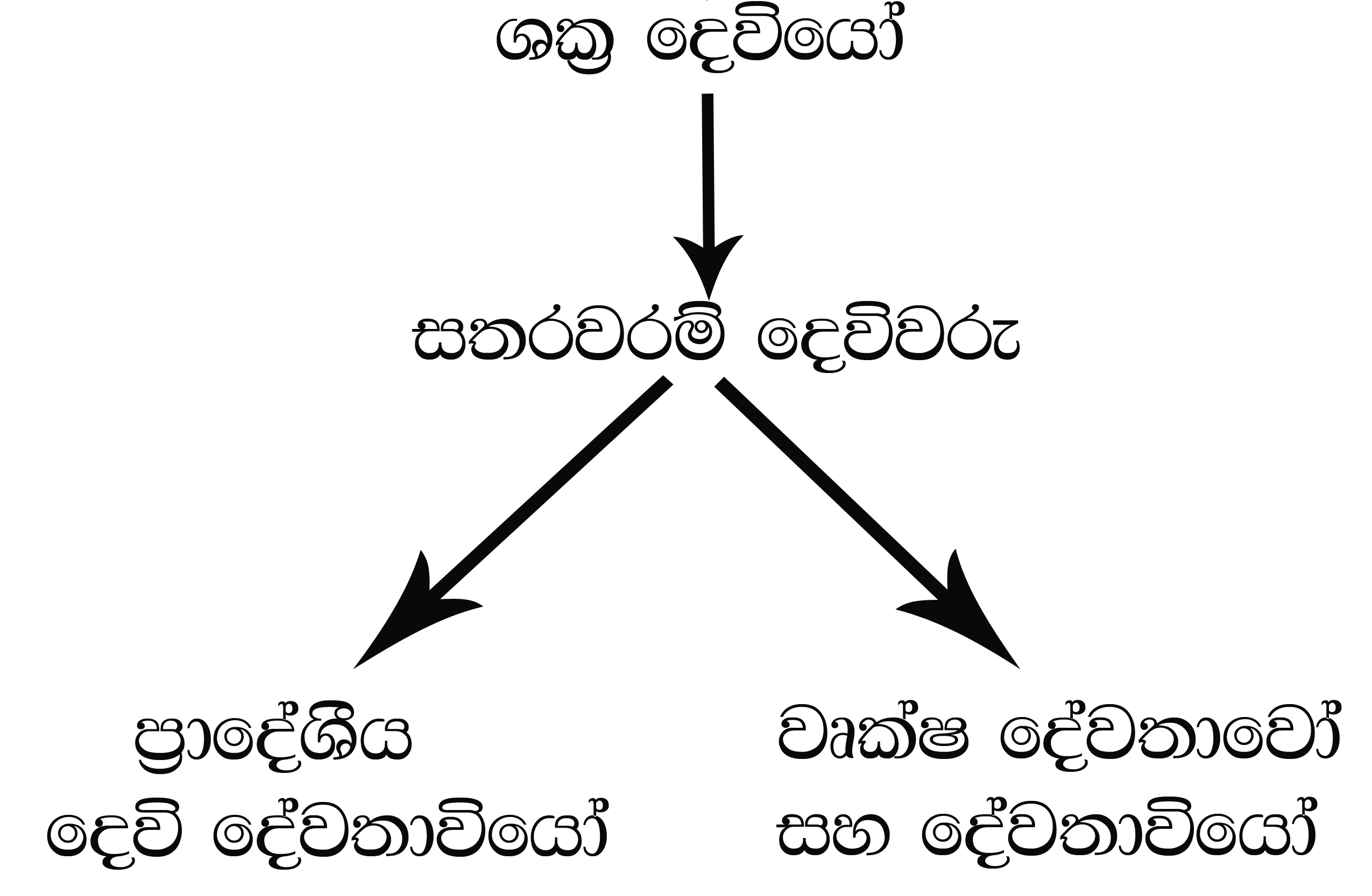 සිංහල: ලක්දිව ඈත අතීතයේ සිට පවතින ඇදහීමක් වන තිස්තුන්කෝටියක් දෙවිදේවතාවෝ